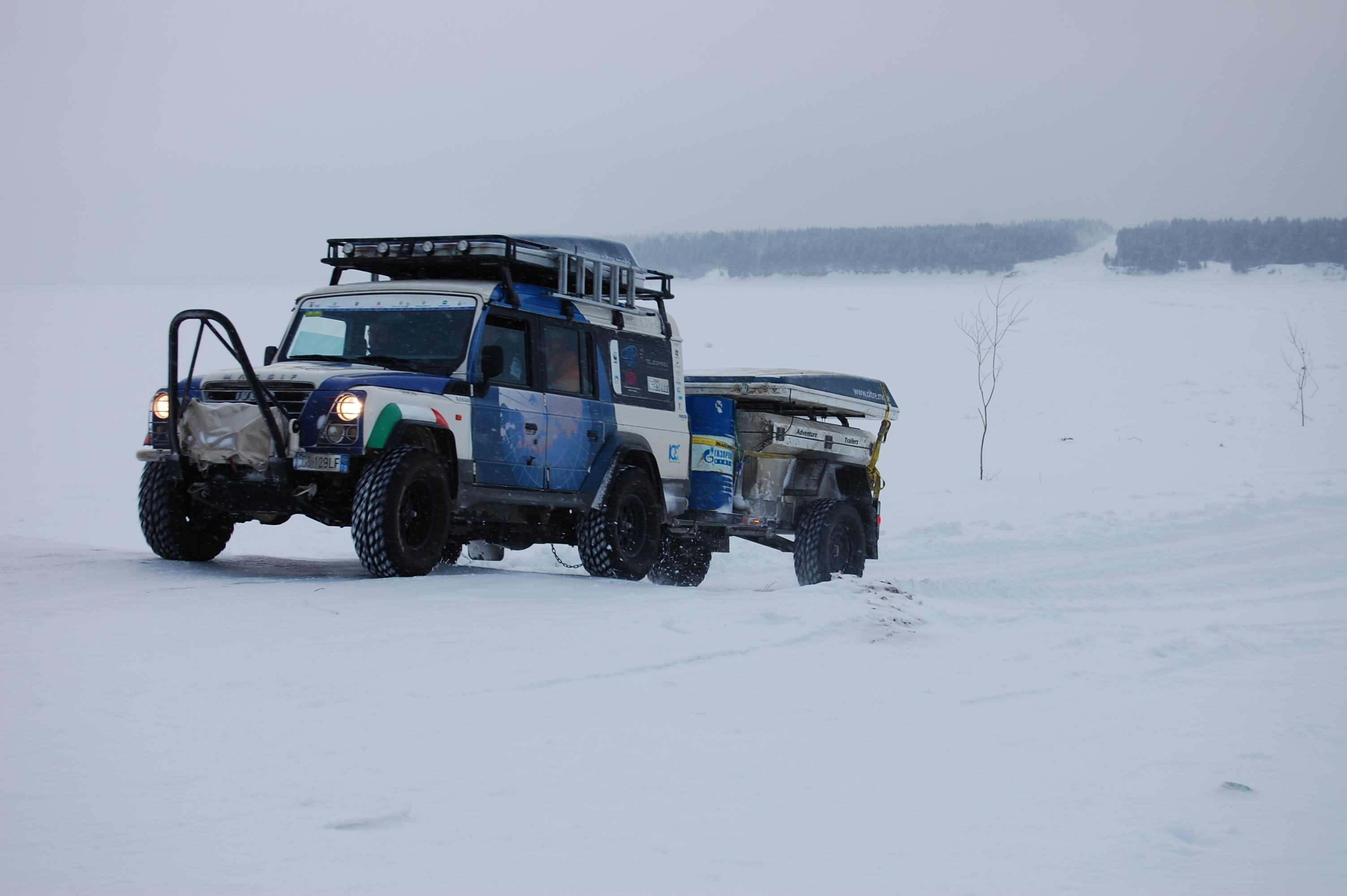 Iveco massif immortalato durante un attraversamento di un fiume ghiacciato nei pressi di Mezen